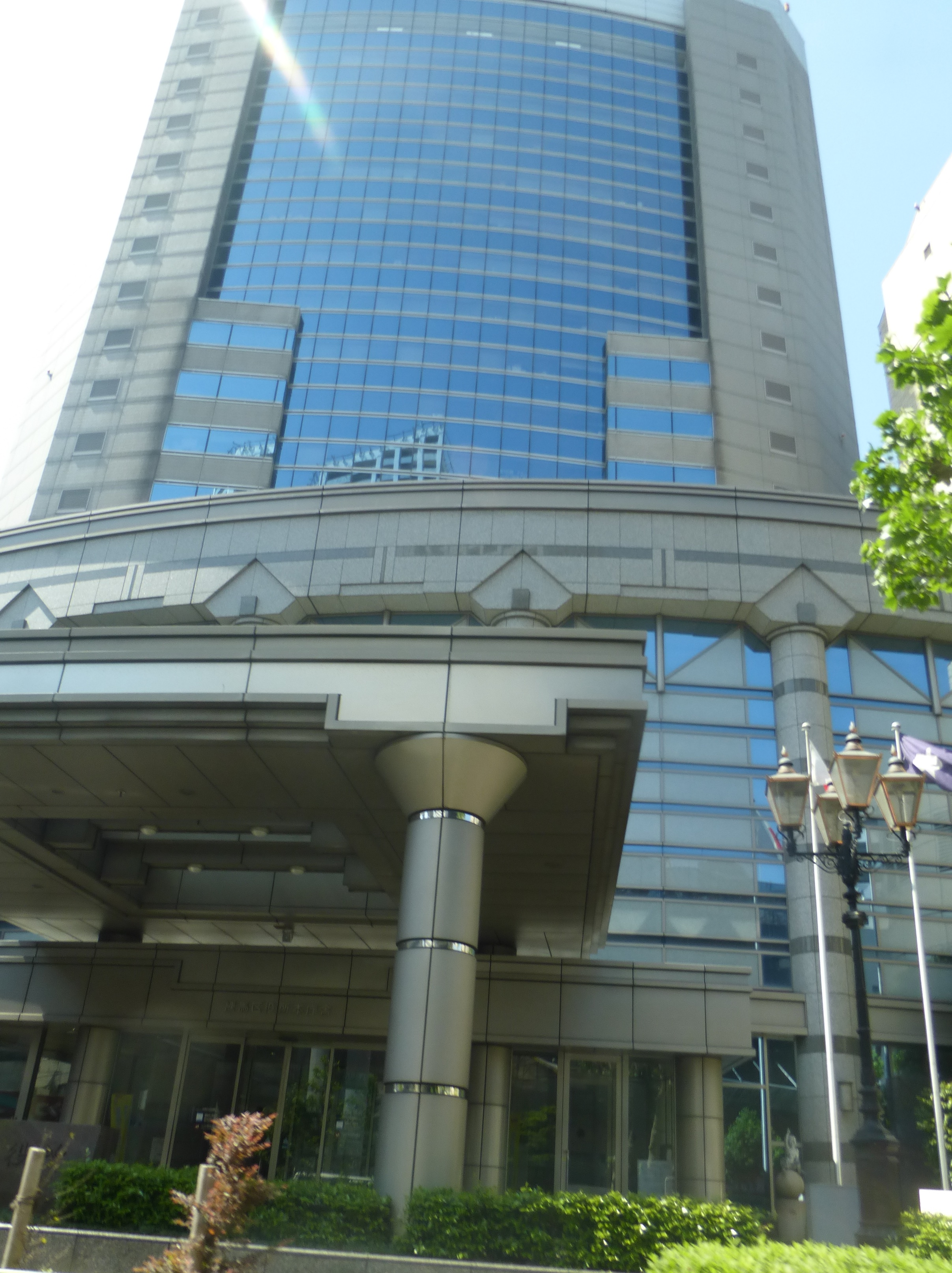 練馬区役所（ねりまくやくしょ, Nerima ward office）